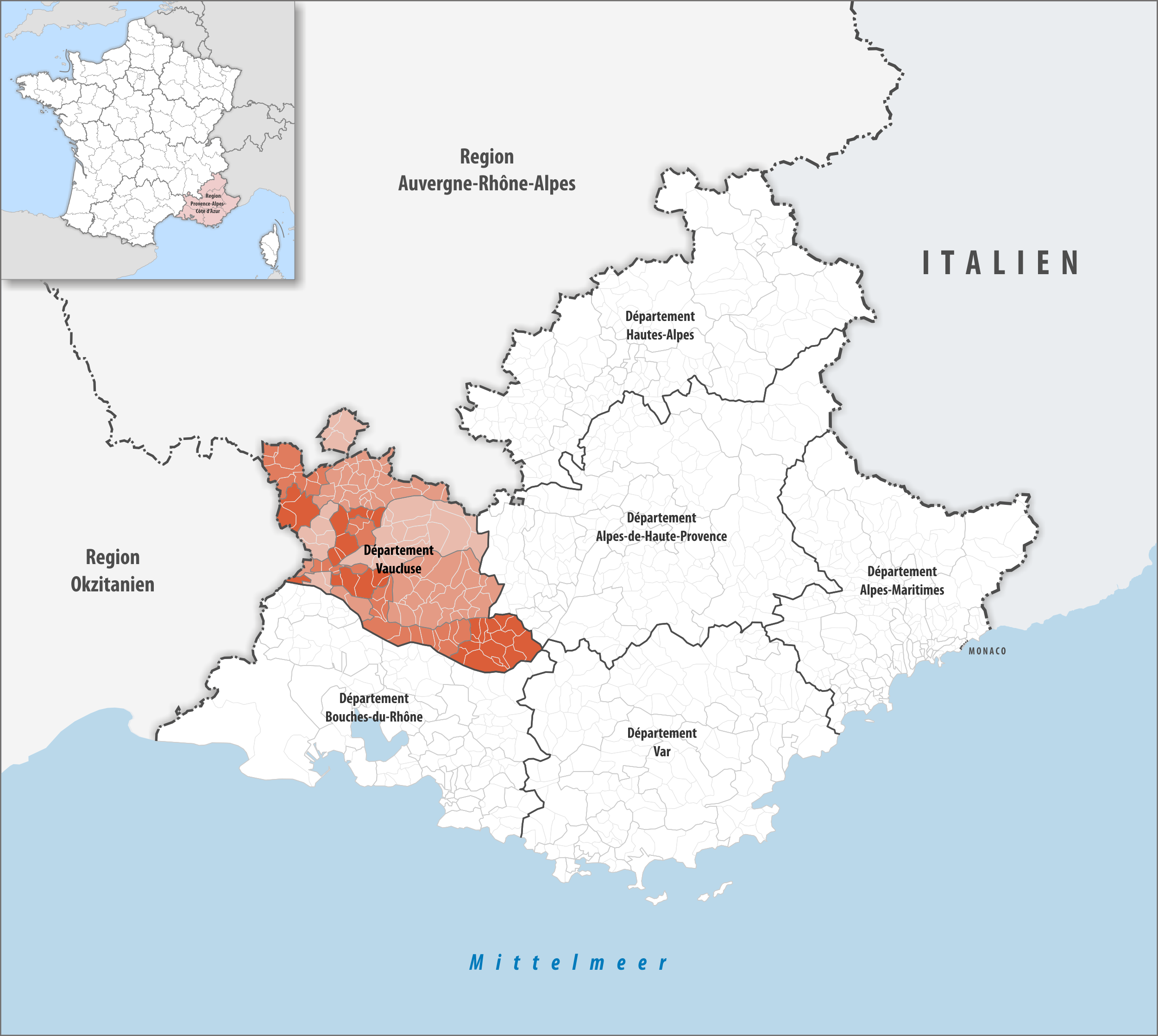 Lage des Departements Vaucluse